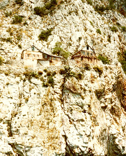 Eremitenbehausungen an der felsigen Steilküste des Südzipfels vom Berg Athos